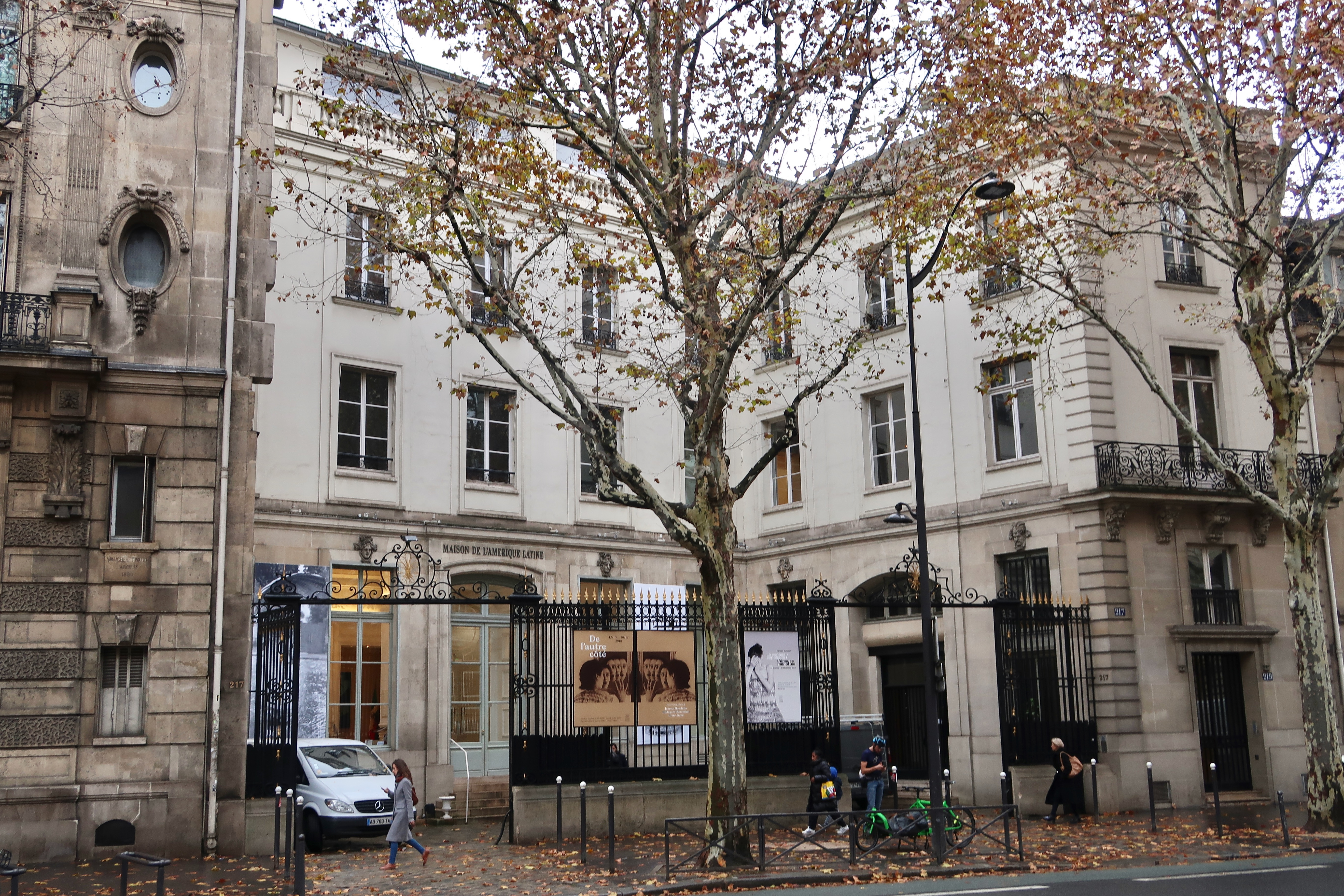 Hôtel de Varengeville, 217 boulevard Saint-Germain (Paris, 7e).